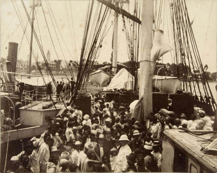 foto. Brits-Indische immigranten aan boord van een schip op de Surinamerivier bij Paramaribo, dat hen terug brengt naar Brits-Indië